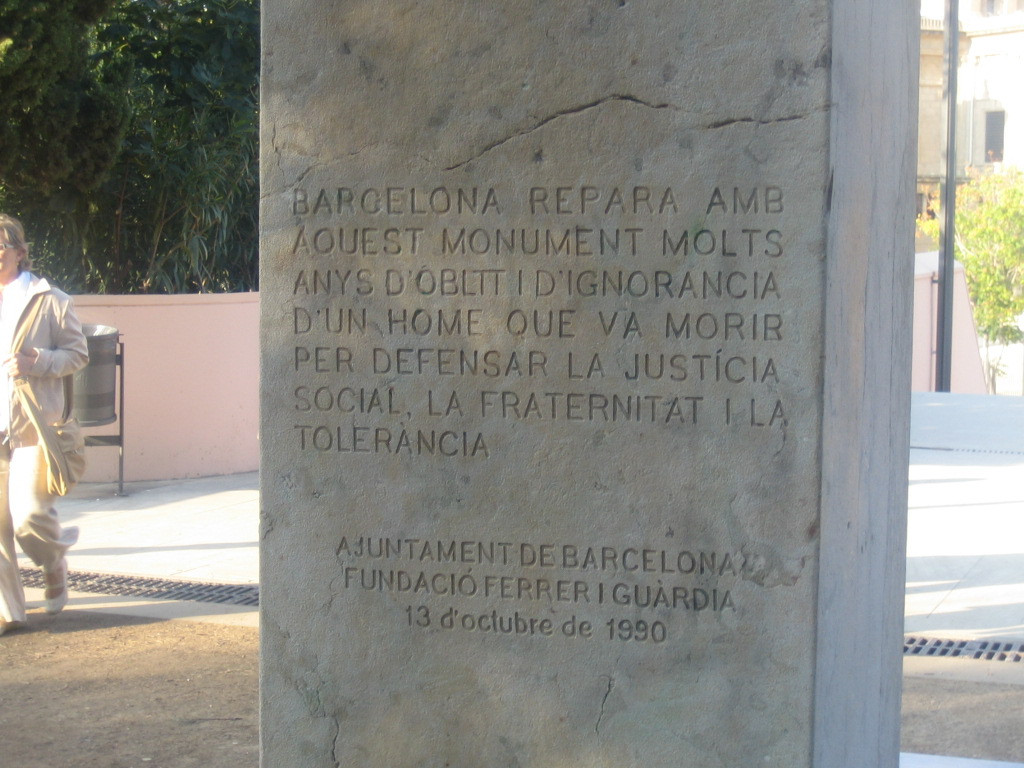 Detalle de monumento a Ferrer i Guardia en Barcelona.